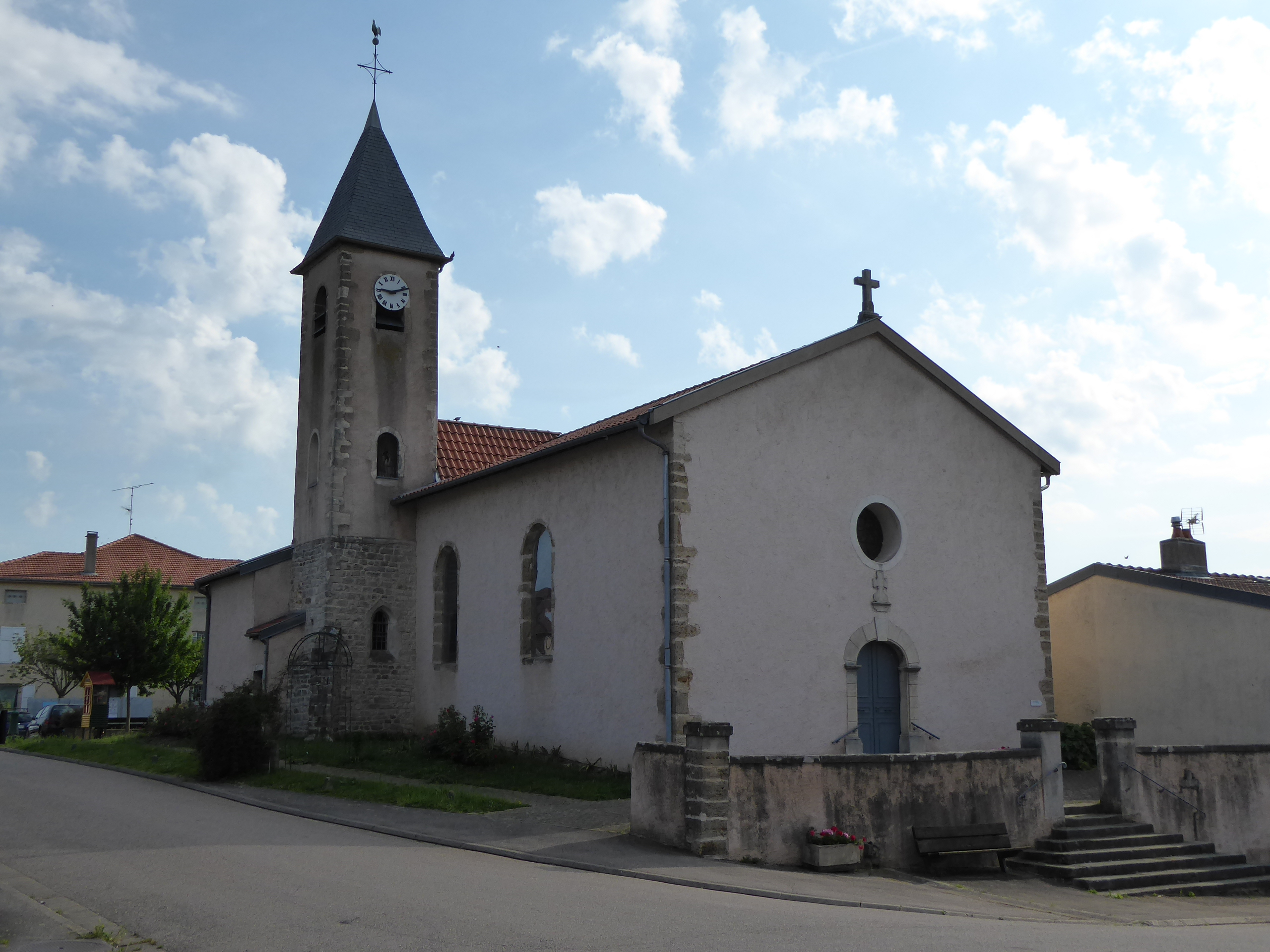 Église de l'Assomption (XVIIIème siècle) et sa tour romane du XIIème siècle à Agincourt près de Nancy en Lorraine.